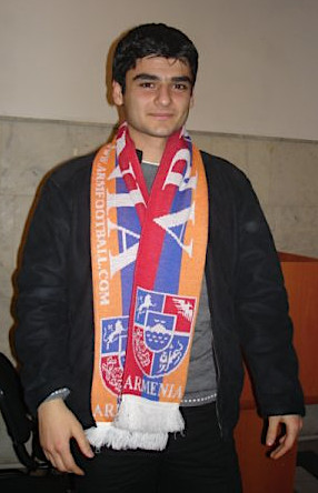 Роберт Норайрович Арзуманян